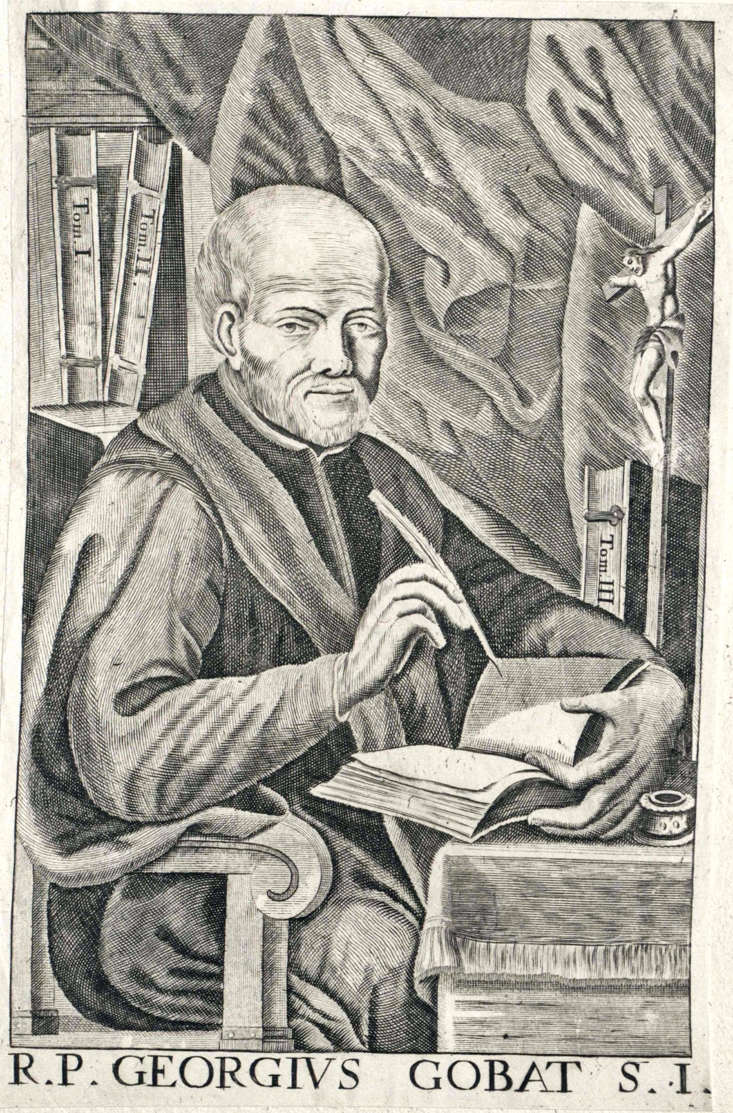 Georg Gobat (1600-1679), französischer Jesuit und Theologe